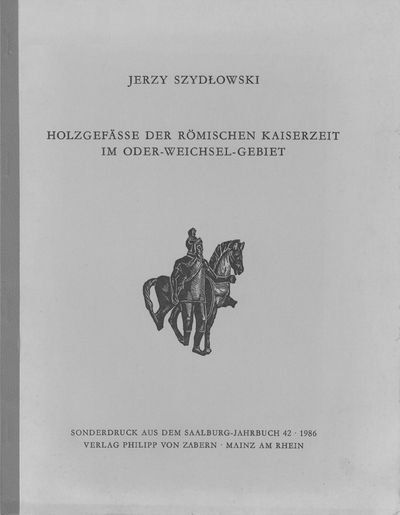 Okładka pracy autorstwa Jerzego Szydłowskiego, dotyczącej naczyń drewnianych na ziemiach Polski w okresie wpływów rzymskich.